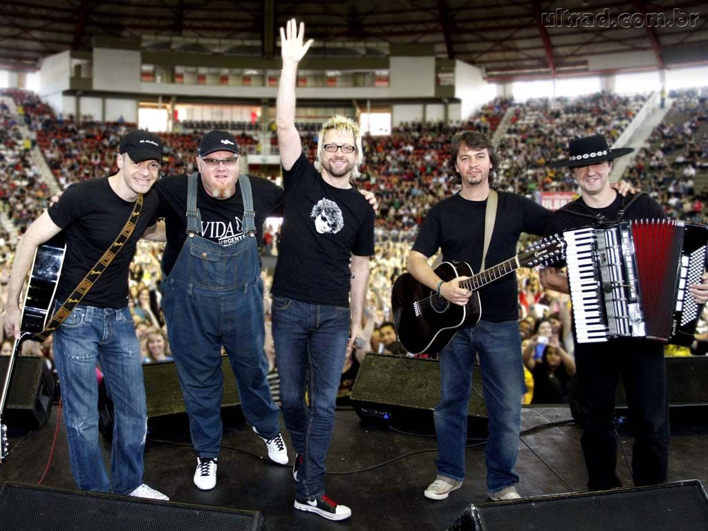 Nenhum de Nós: formação oficial atual